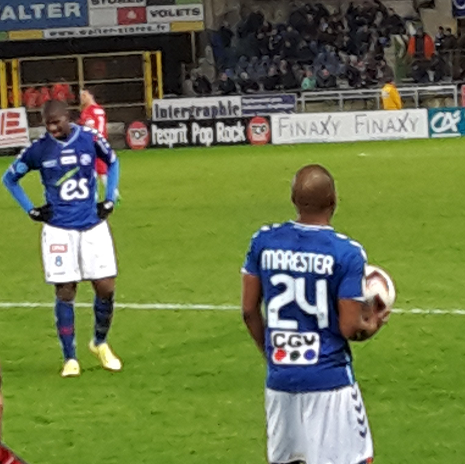 Eric Marester et Massiré Kanté sous le maillot du RCSA.